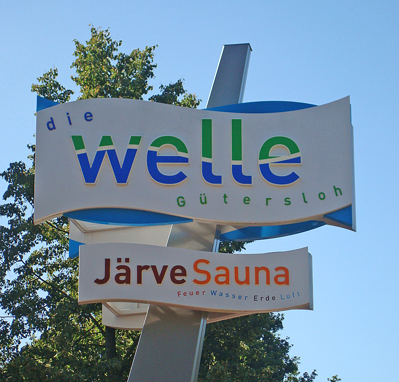 Die Welle Gütersloh